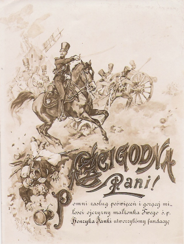 Akt założenia Fundacji im. H.Janki przekazany wdowie.